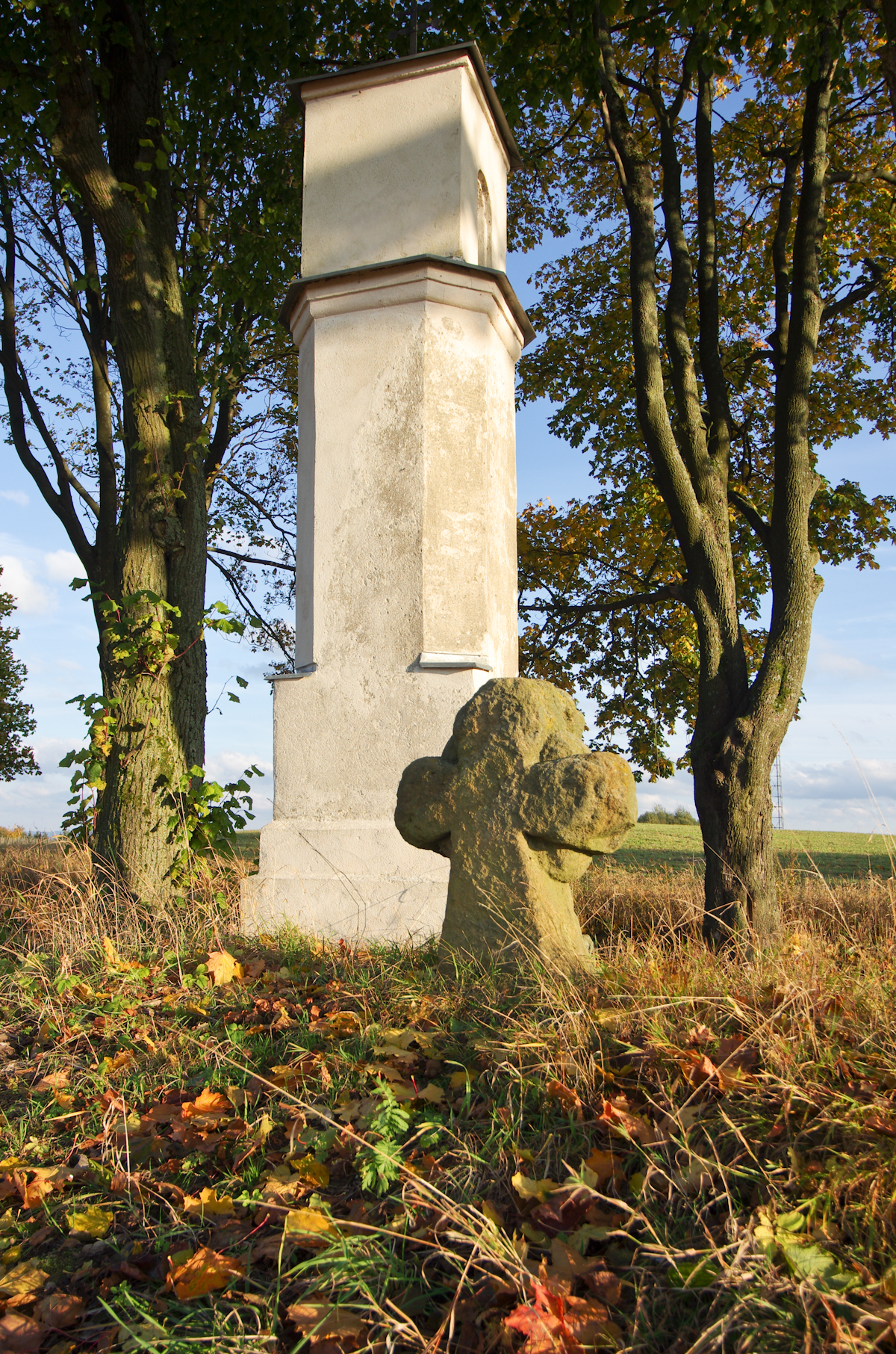 Smírčí kříž a boží muka (Krajková), při silnici do vsi Květná, Krajková